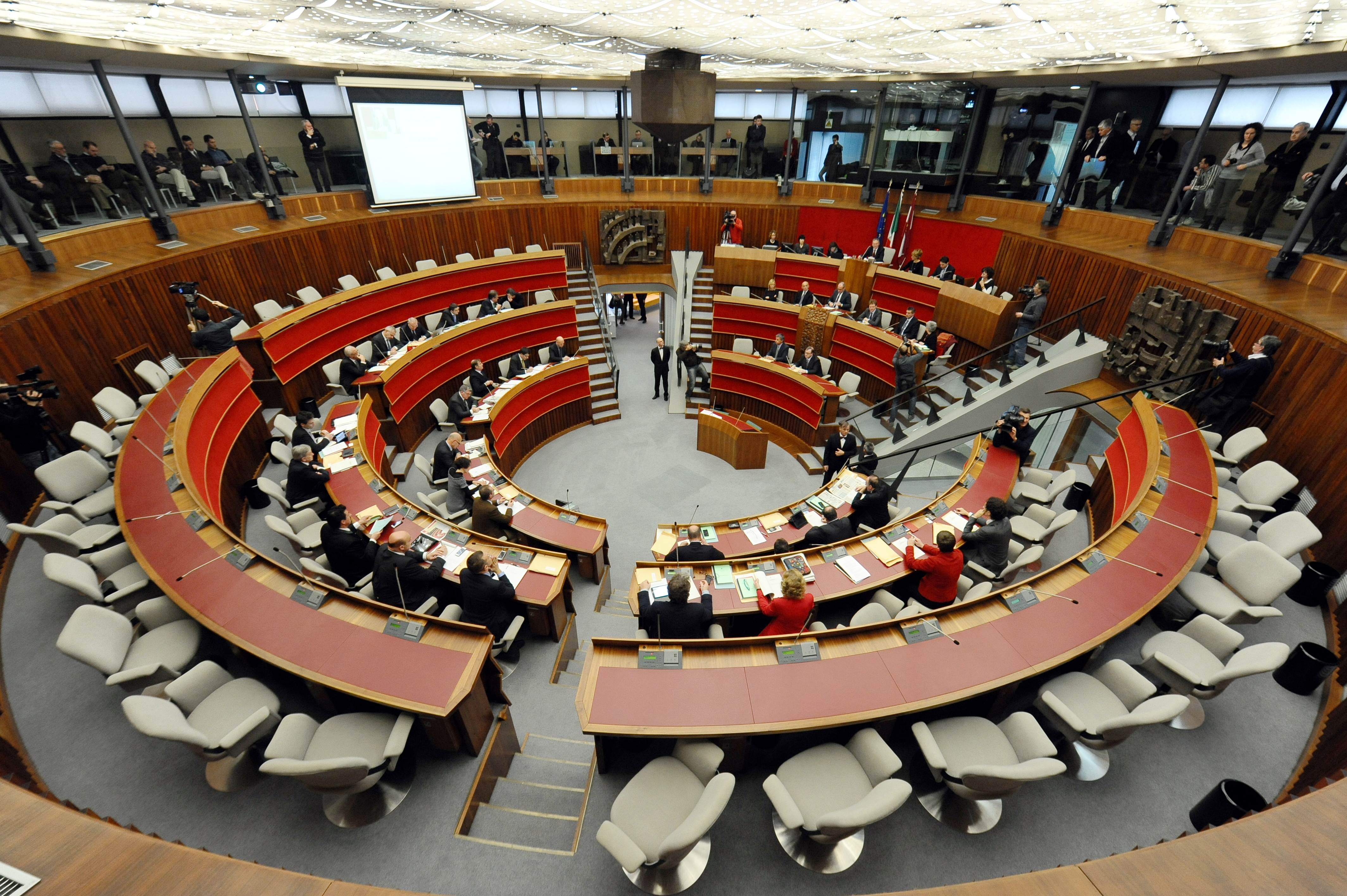 Palazzo della Regione in Piazza Dante a Trento. La Sala del Consiglio durante una seduta del consiglio provinciale. La sala è utilizzata sia dal consiglio provinciale (35 persone) che dal consiglio regionale (70 persone), quindi durante le sedute del primo metà dei posti rimangono vuoti.